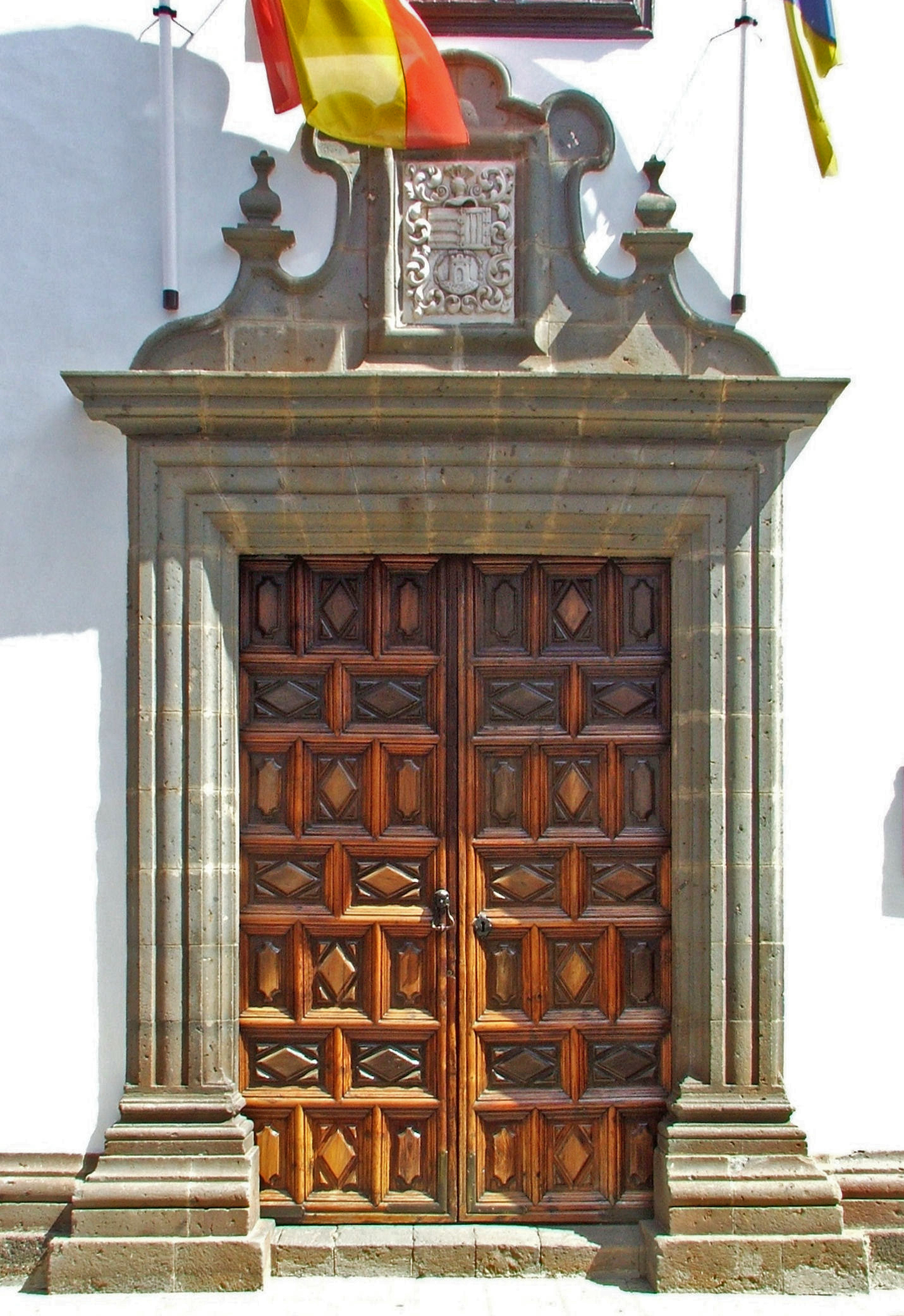 Casa Montañéz, Portal, La Laguna